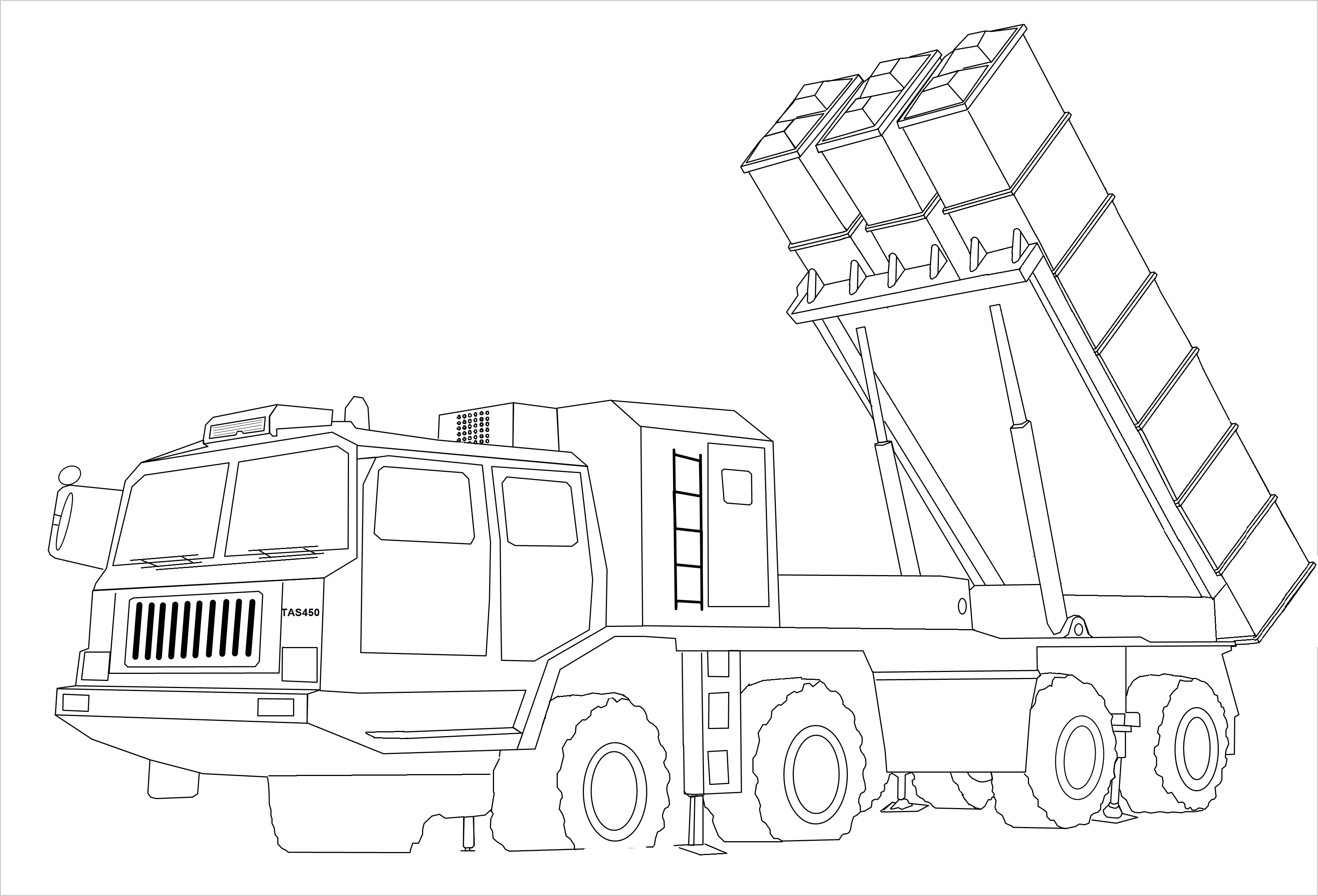 Эскиз РСЗО WS-2D (Китай) с дальностью стрельбы до ~400 км и коррекцией полёта ракеты на последнем участке по данным беспилотного корректировщика-целеуказателя. Источник: А. Храмчихин "Дракон проснулся" Москва: Ключ-С, 2015